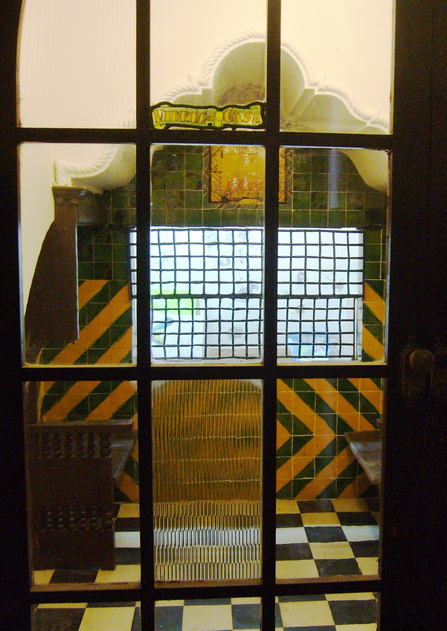 Galeria Bells Oficis